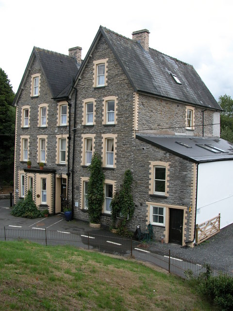 Cammarch Hotel, Llangammarch Wells